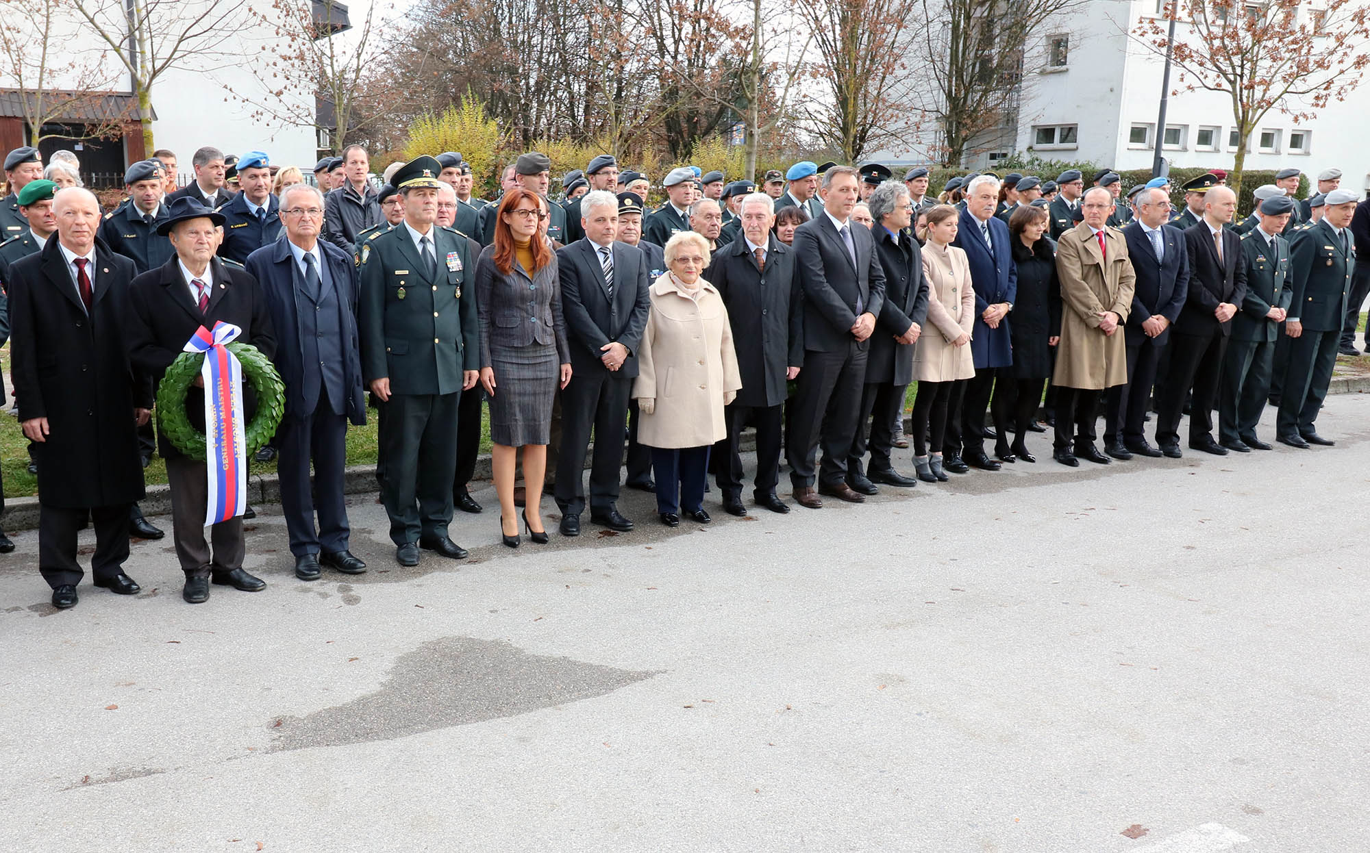 Na Ministrstvu za obrambo zaznamovali dan Rudolfa Maistra.